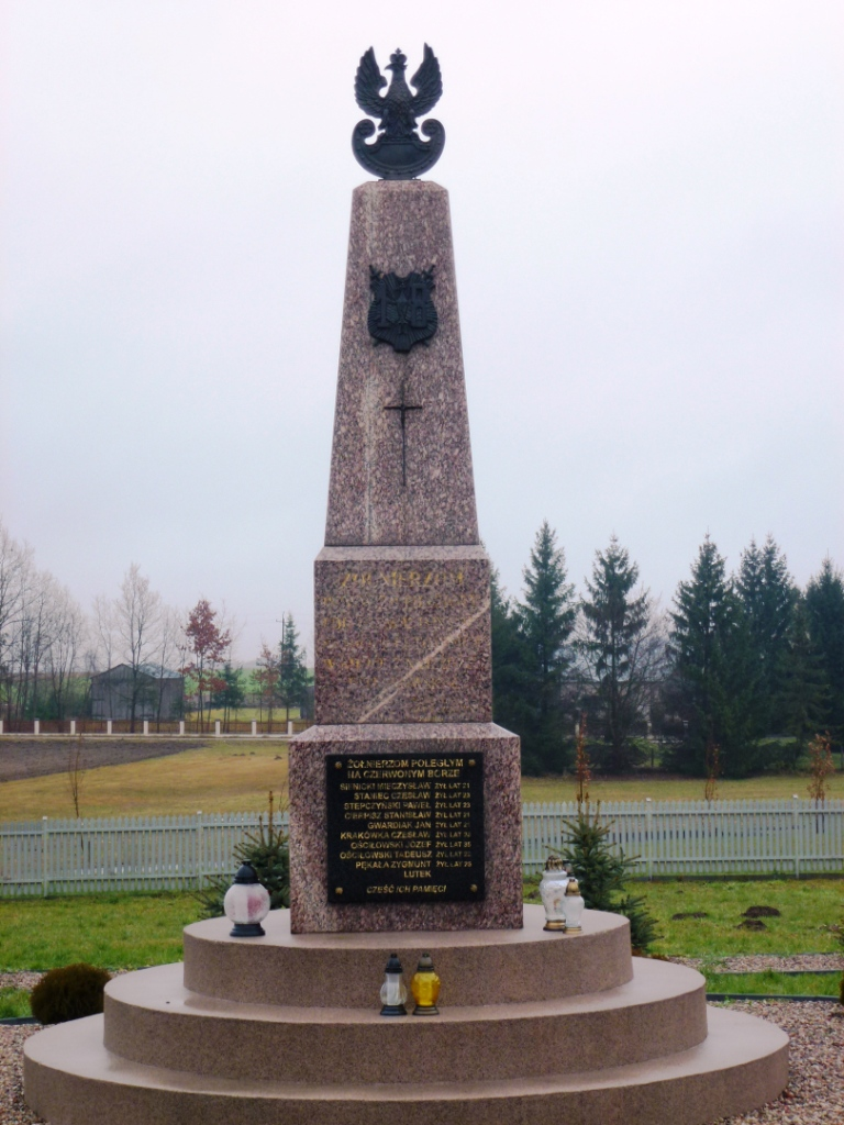 Pomnik upamiętniający żołnierzy 18 Dywizji Piechoty poległych na polach Łętownicy w walkach z Niemcami w dniach 12 - 13 września 1939 roku